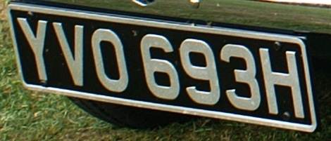 licenseplate GB old